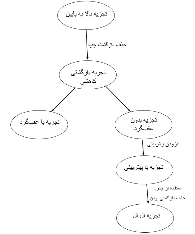 در صفحه تجزیه کننده بازگشتی کاهشی ، جهت نمایش انواع تجزیه و رابطه های آن ها اضافه شده است